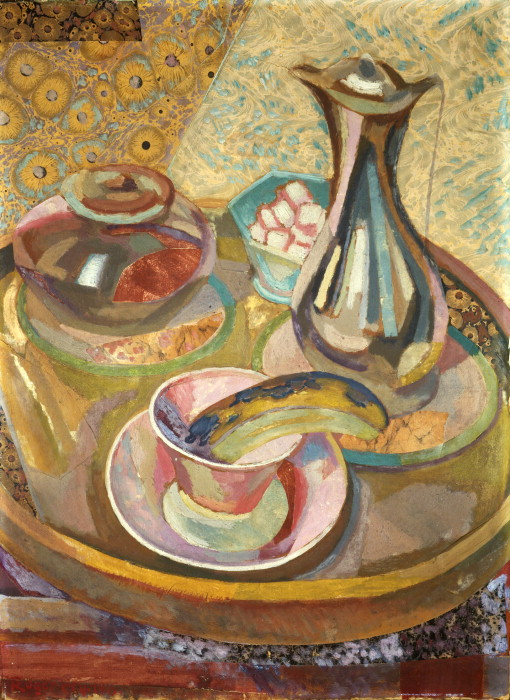 Naturaleza muerta